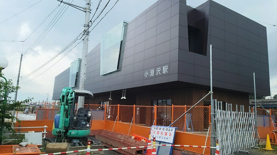 小淵沢駅新駅舎の画像です。